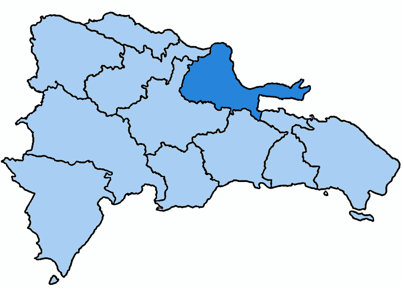 Mappa della diocesi cattolica di San Francisco de Macorìs, nella Repubblica Dominicana. Anno 2009.